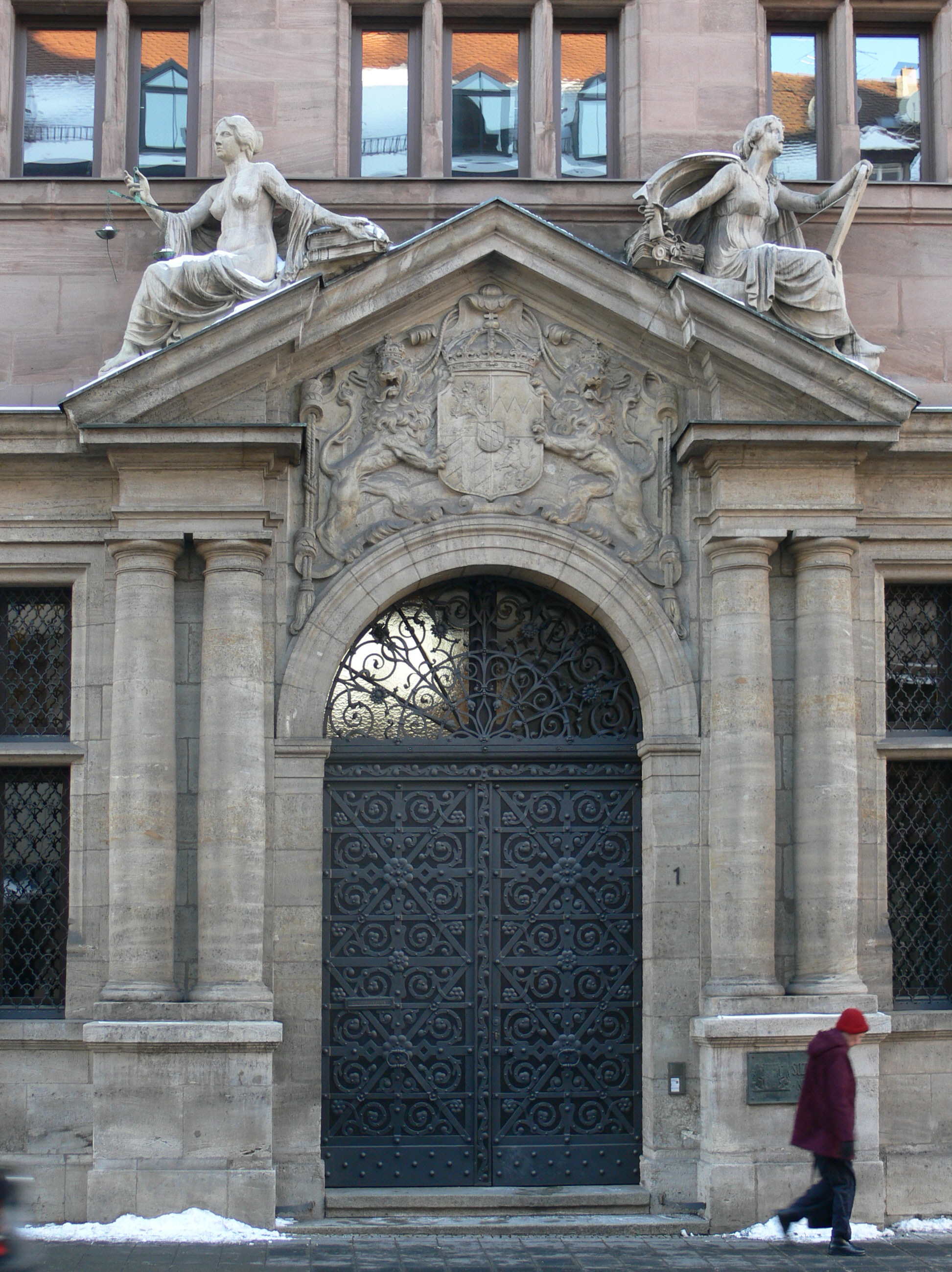 Nürnberg, Gerichtsgebäude Weintraubengasse 1 (heute: Sozialgericht), erbaut 1901, Portal